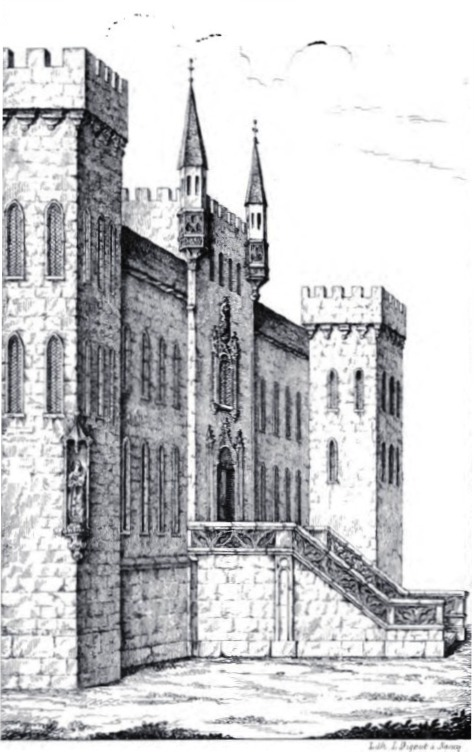 Palais des Treize oder Palast der Dreizehn, der administrative Stadtpalast für das Kollegium der dreizehn Vertreter der reichsten Patrizierfamilien der Stadtrepublik Metz. Er wurde für die Errichtung des Place d'armes abgerissen